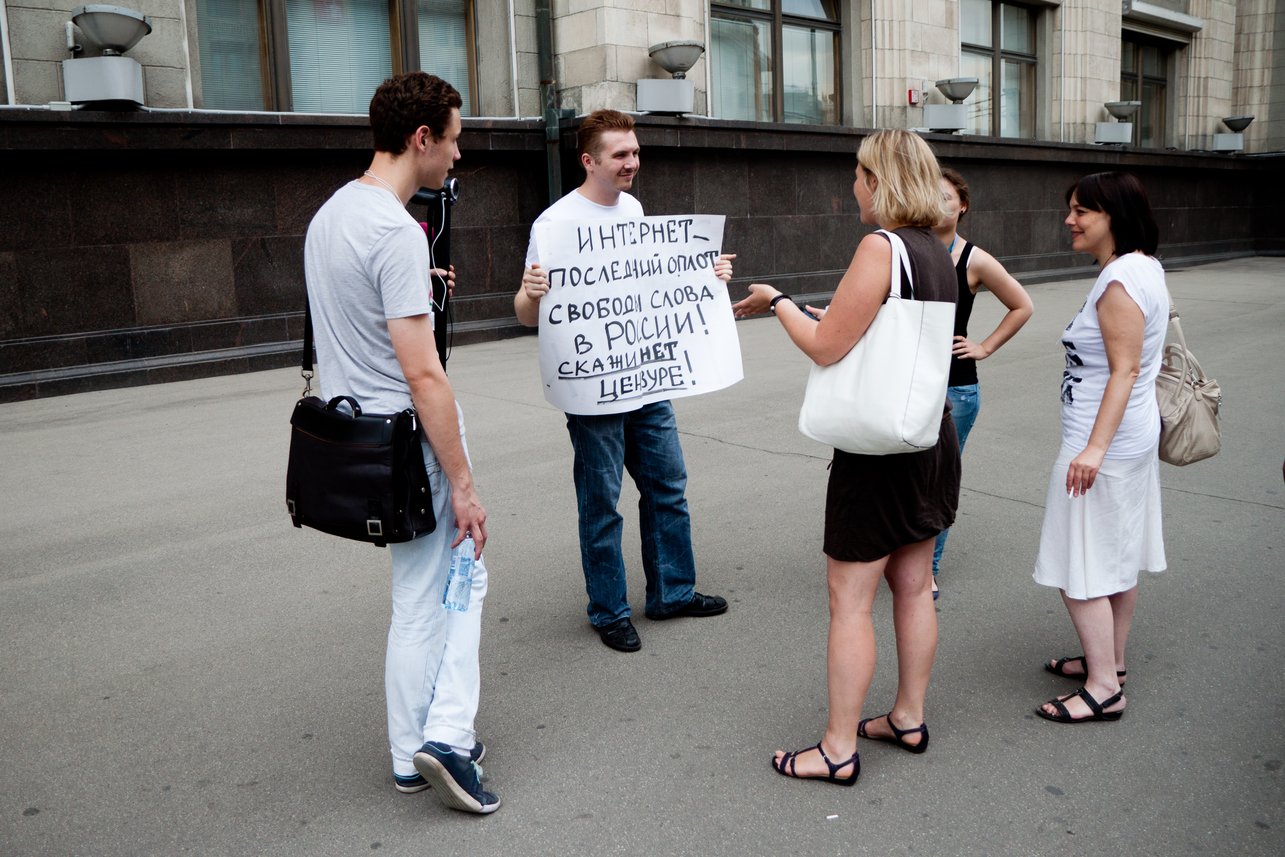 Одиночный пикет у здания Государственной думы в день принятия законопроекта № 89417-6